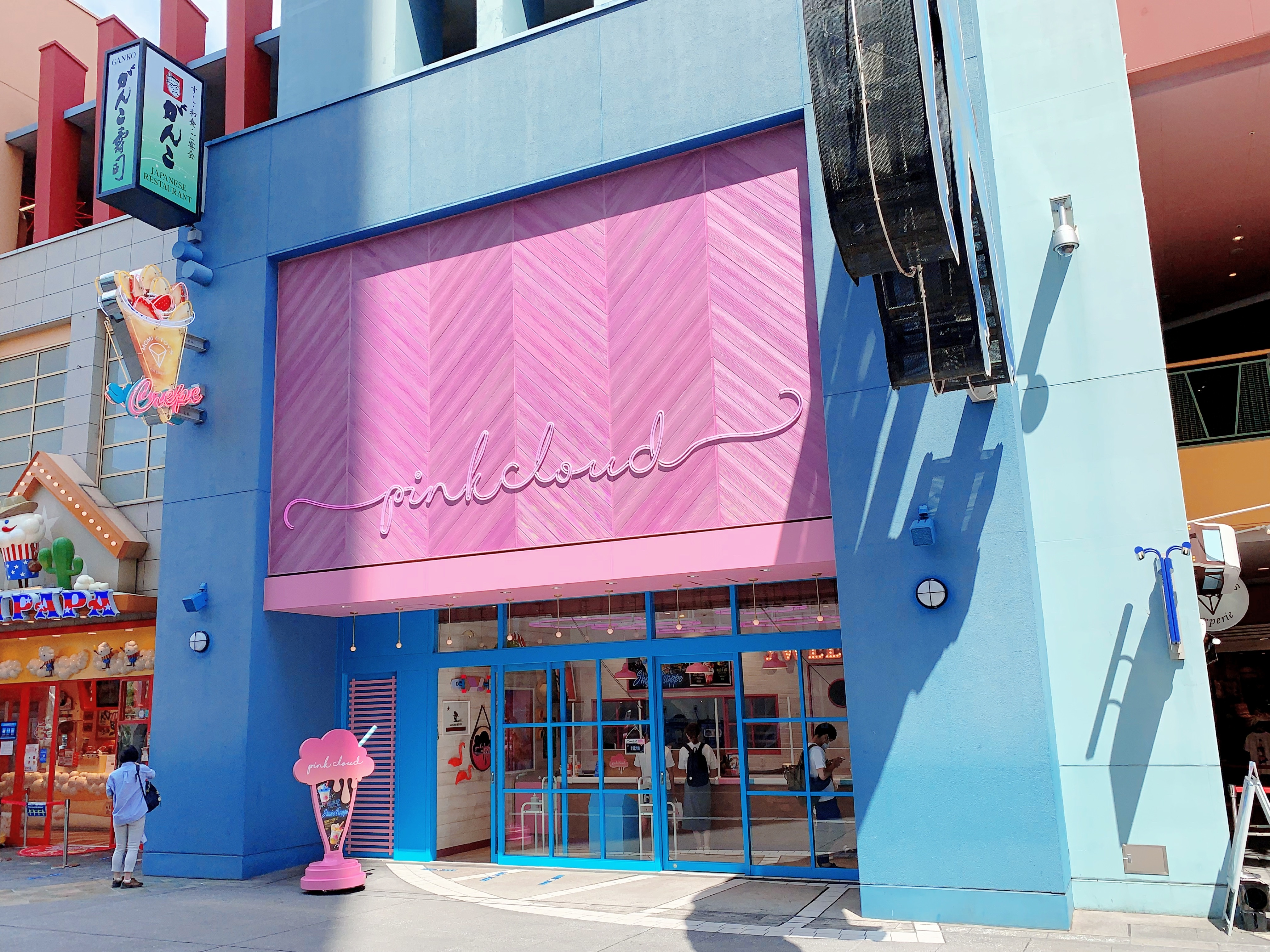 Appearance of the Pink Cloud